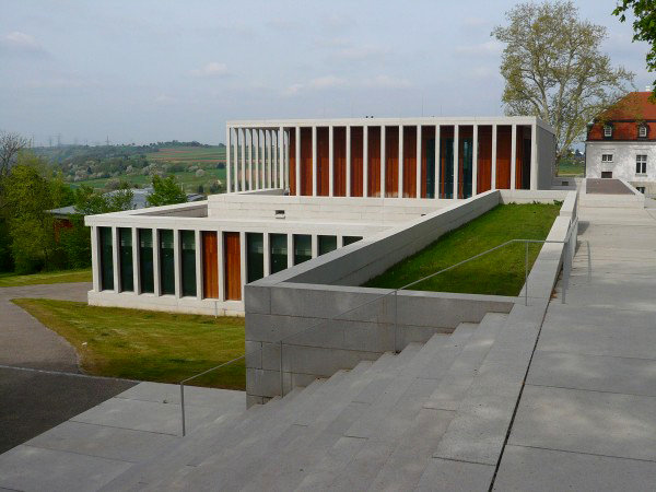 múzeum modernej literatúry v Marbachu